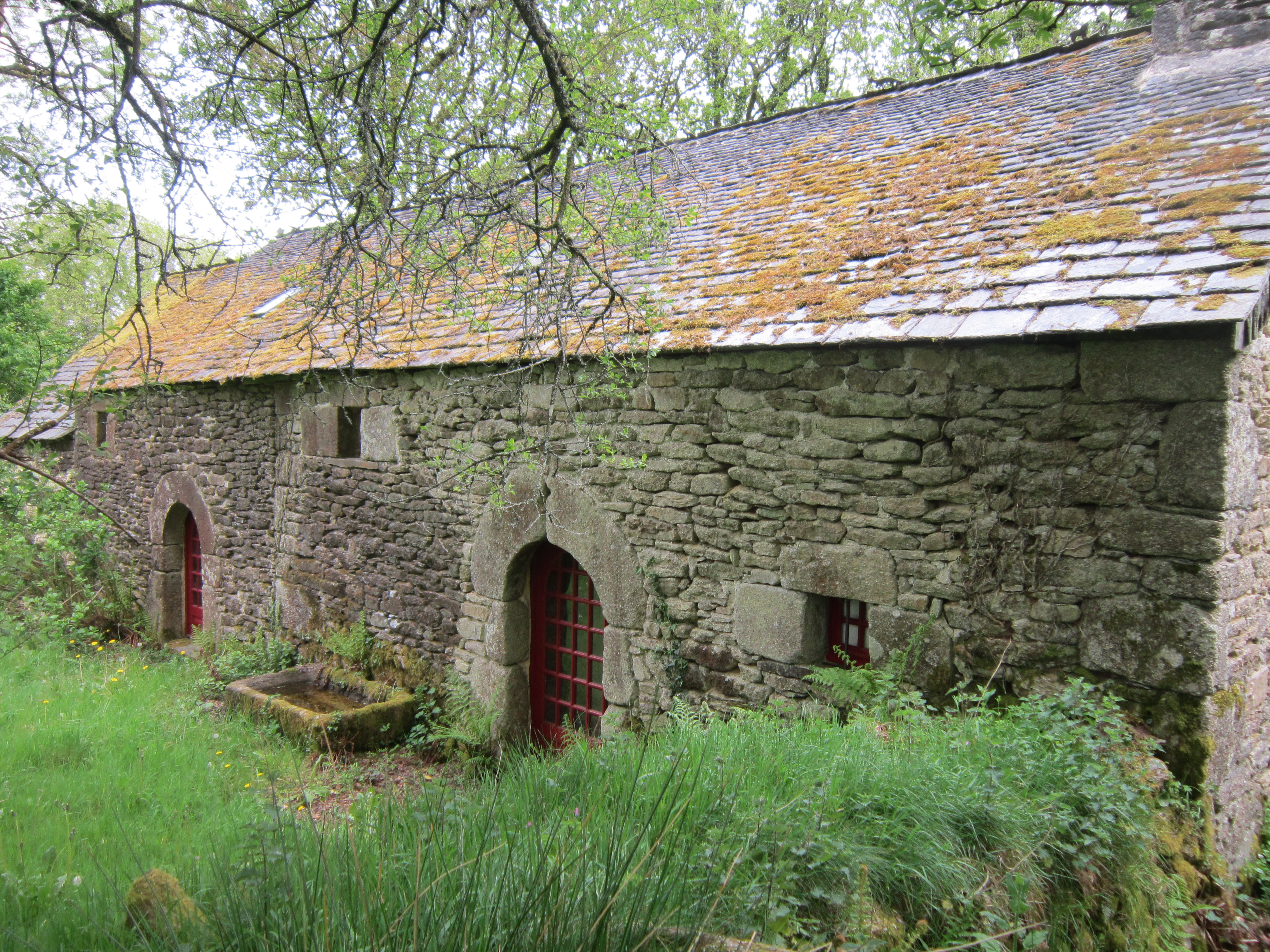 Berrien : ferme traditionnelle au Goënidou : façade avant.